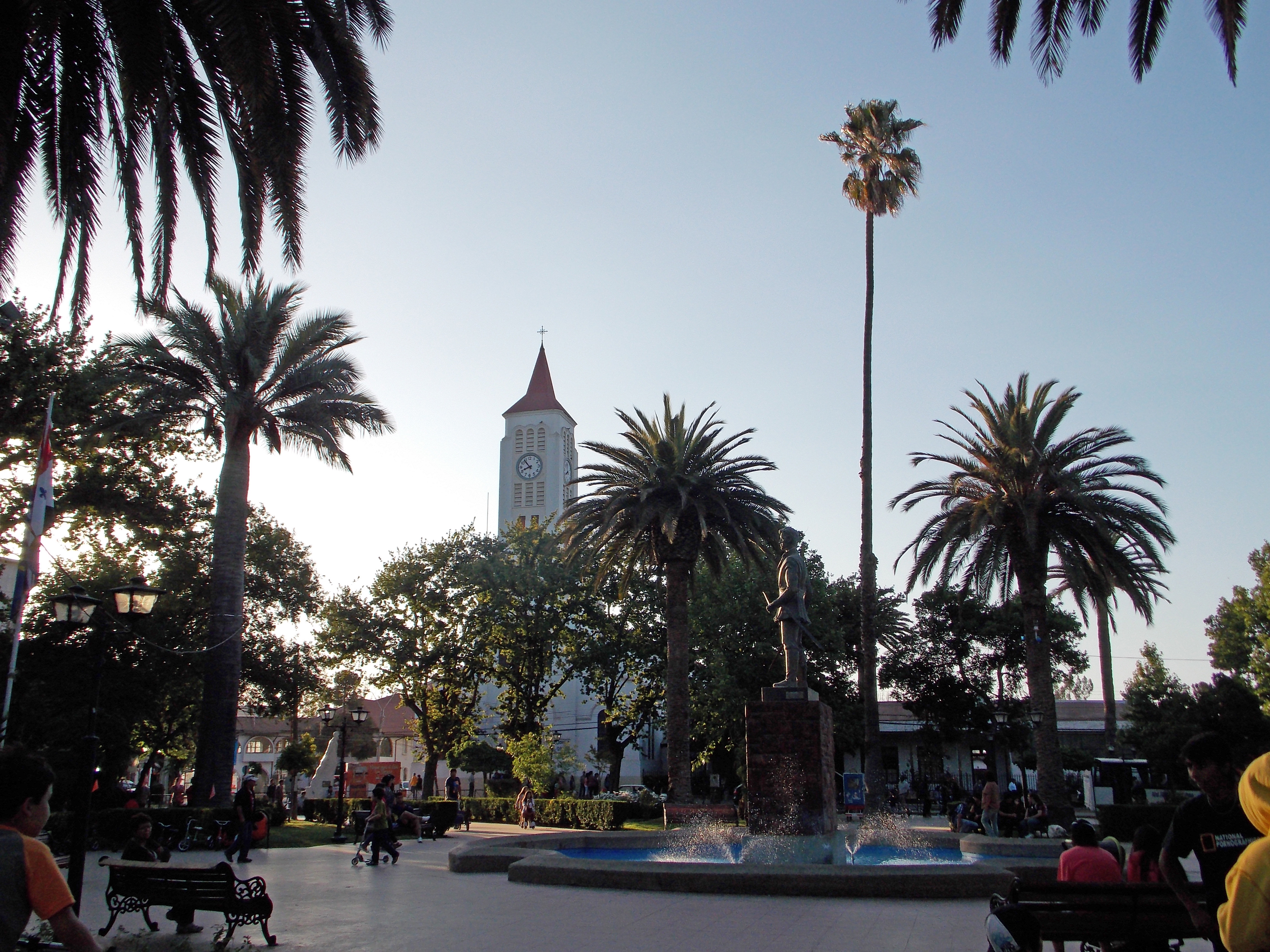 Plaza de Armas de Casablanca, V Región de Valparaíso